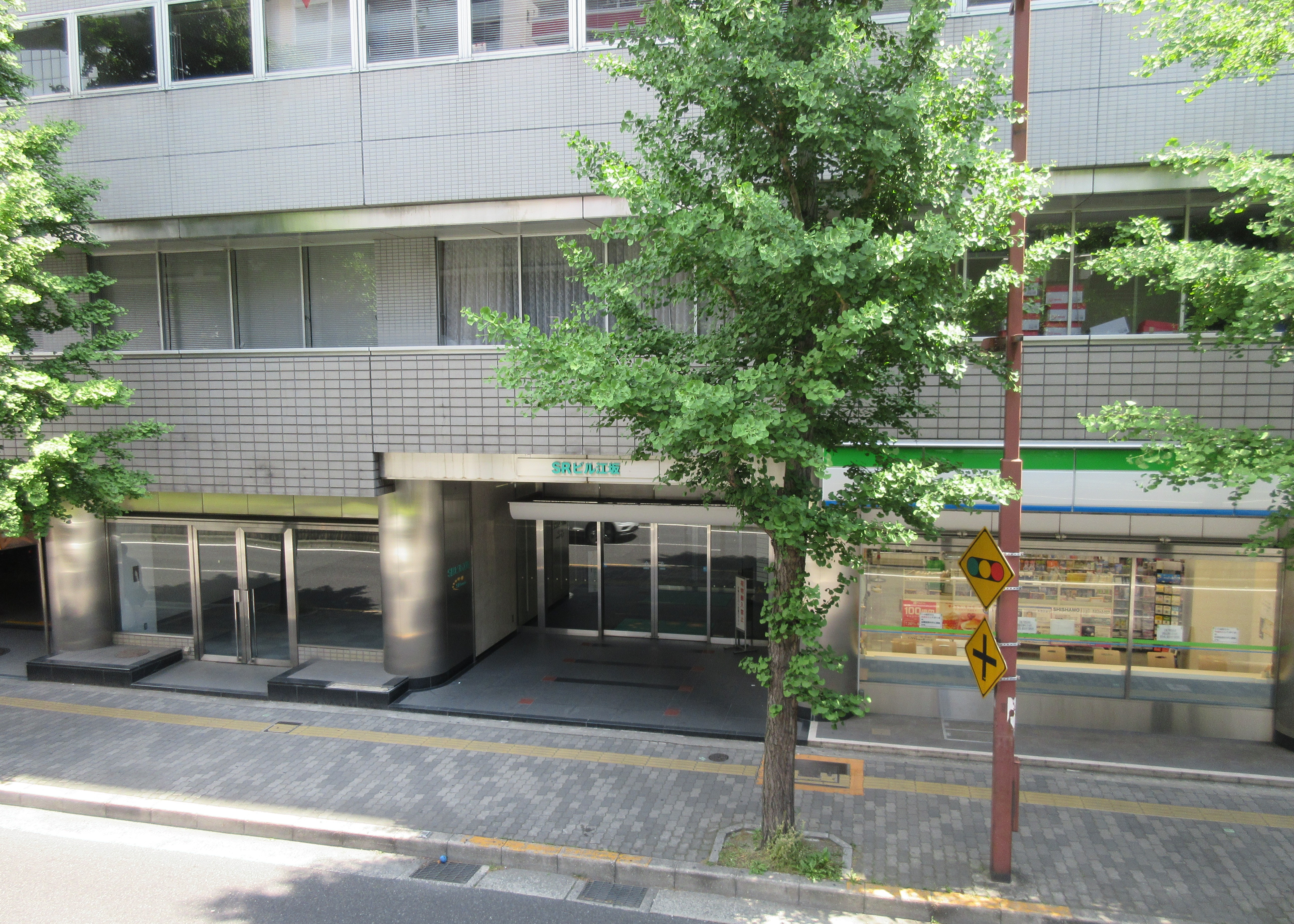 SRビル江坂